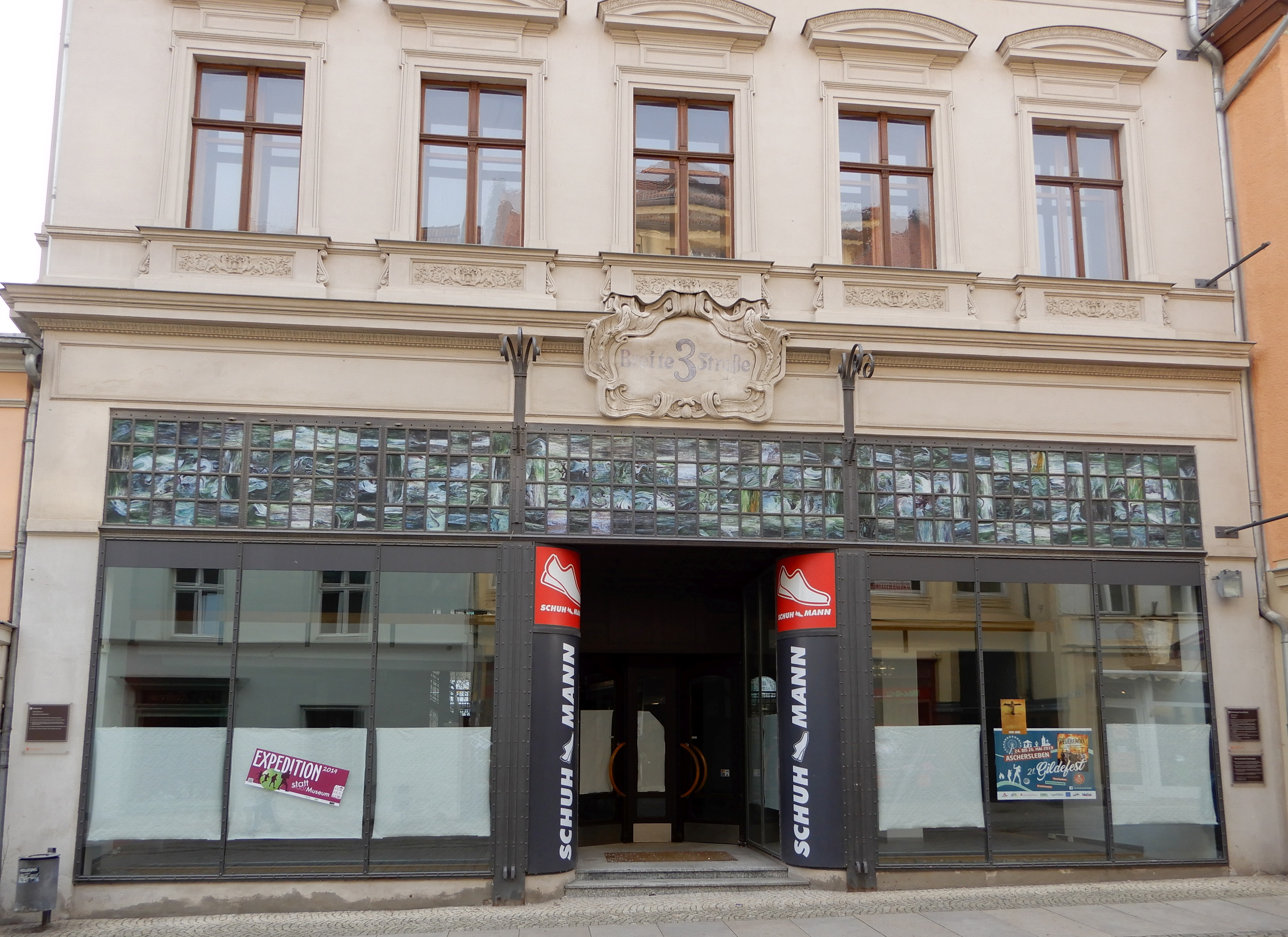 Haus Breite Straße 3